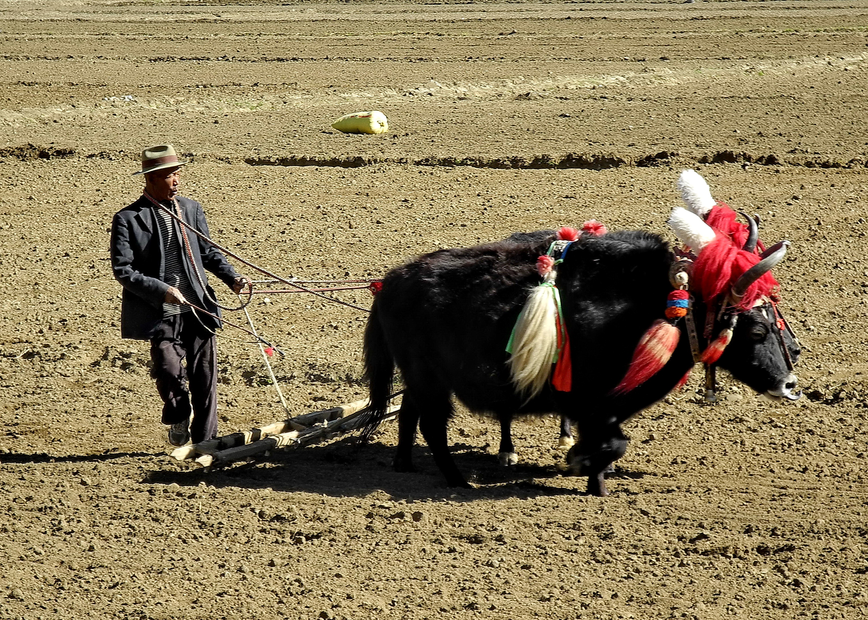 labourage au Tibet